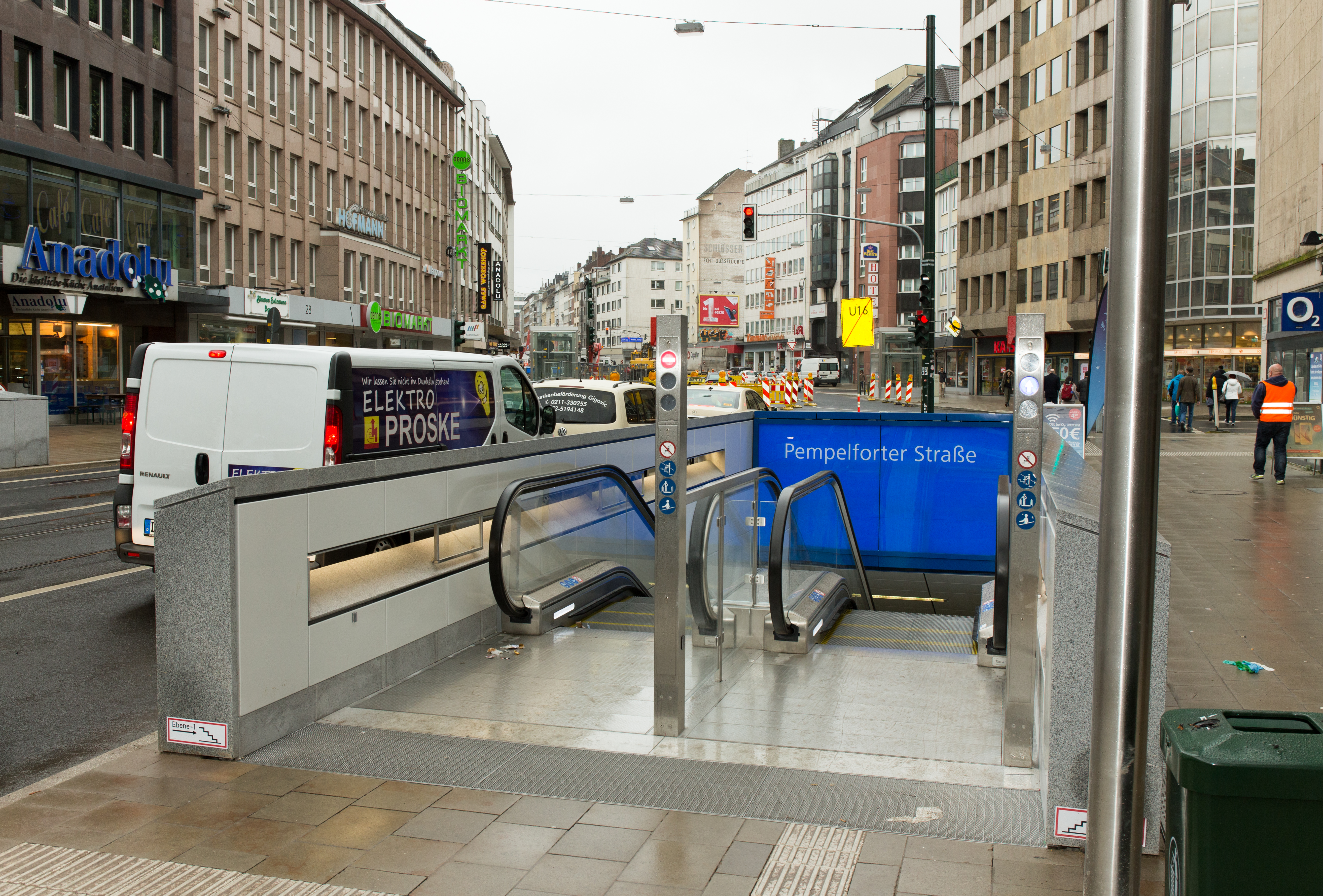 Wehrhahnlinie, U-Bahnhof Pempelforter Straße